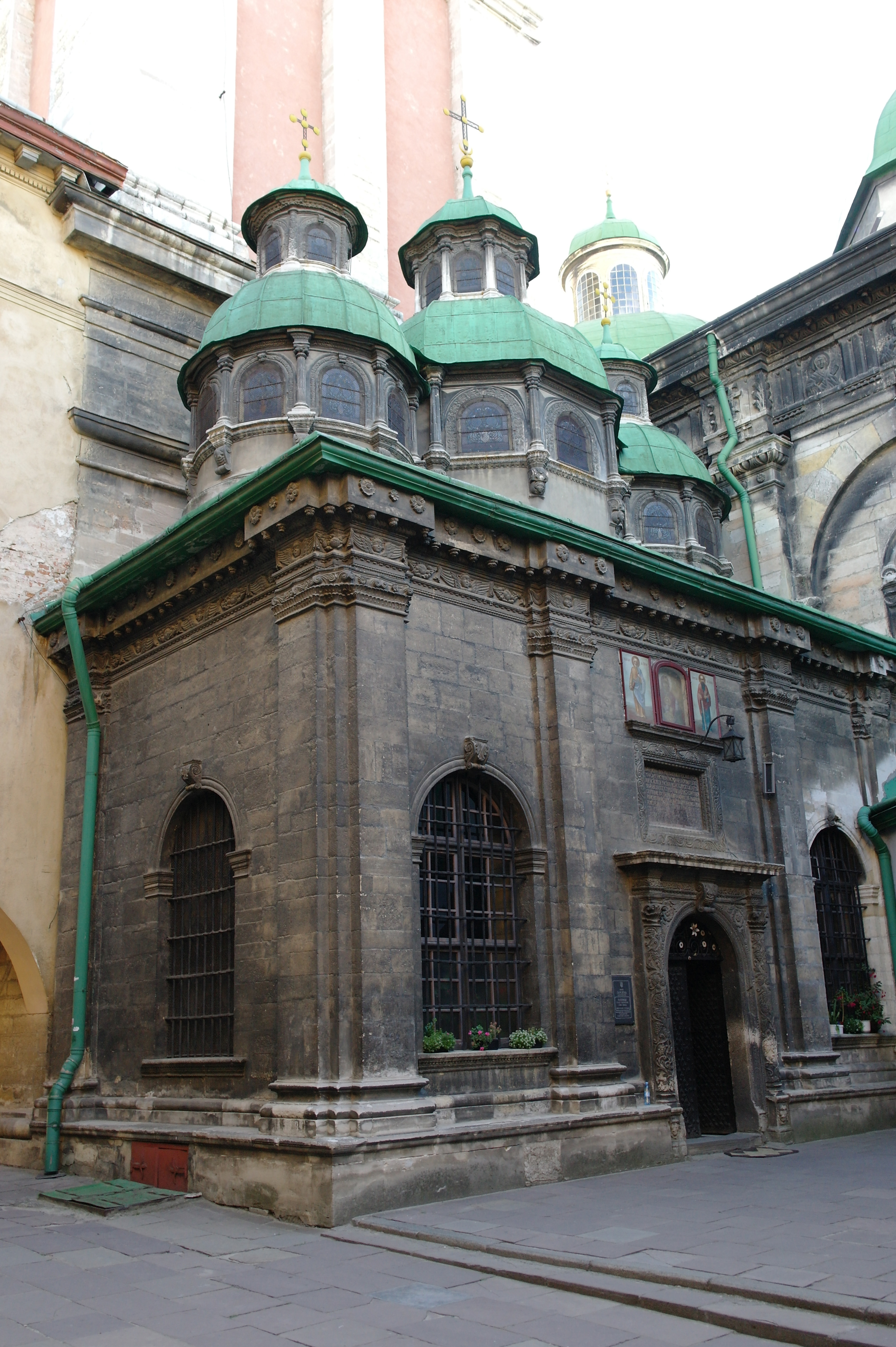 Львів, каплиця Трьох Святителів